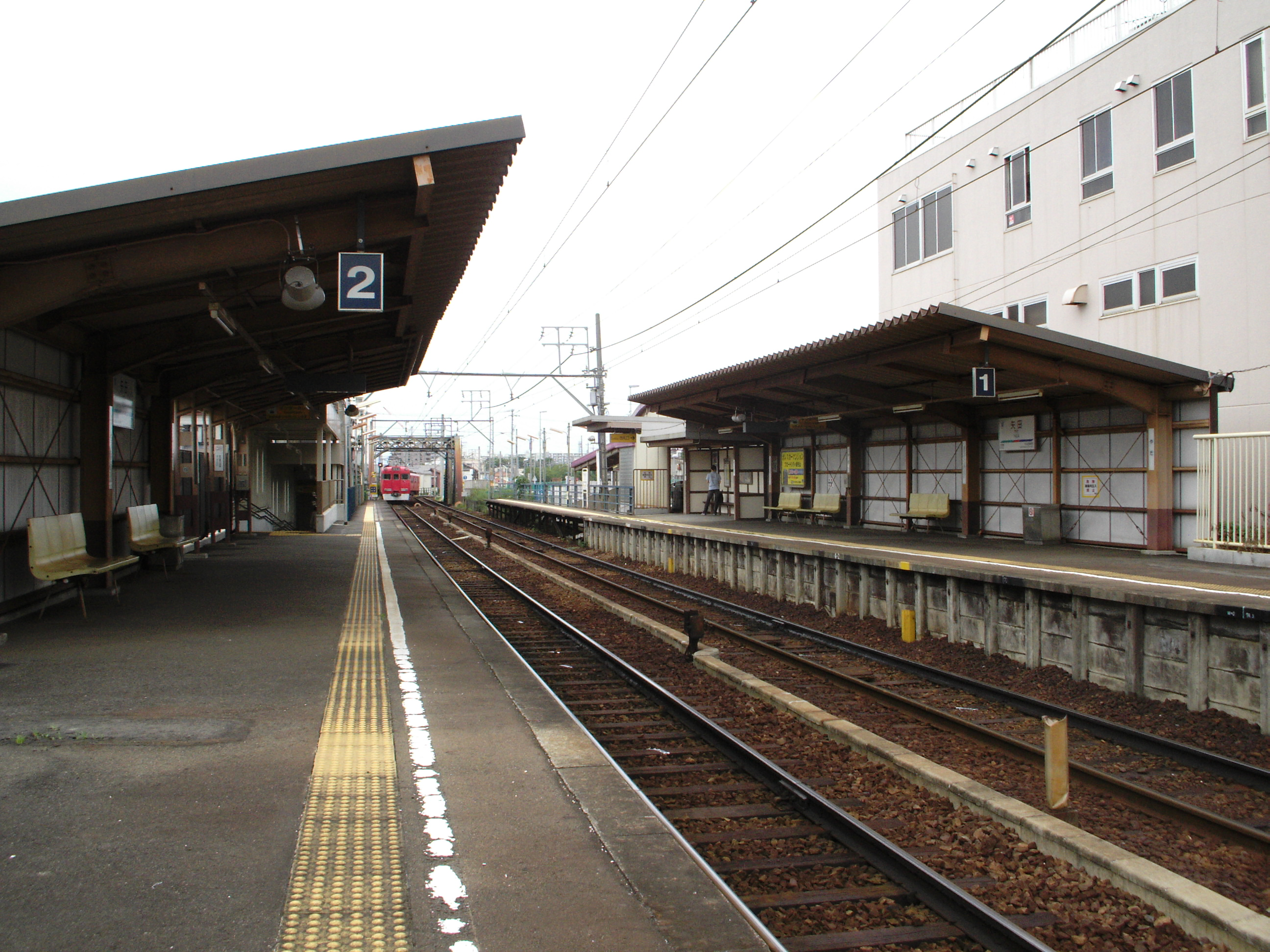 矢田駅プラットホーム